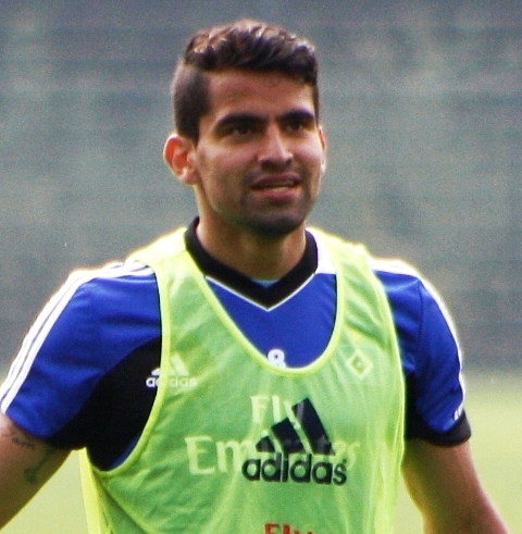 Tomás Rincón beim HSV-Training am 25. Juli 2013.